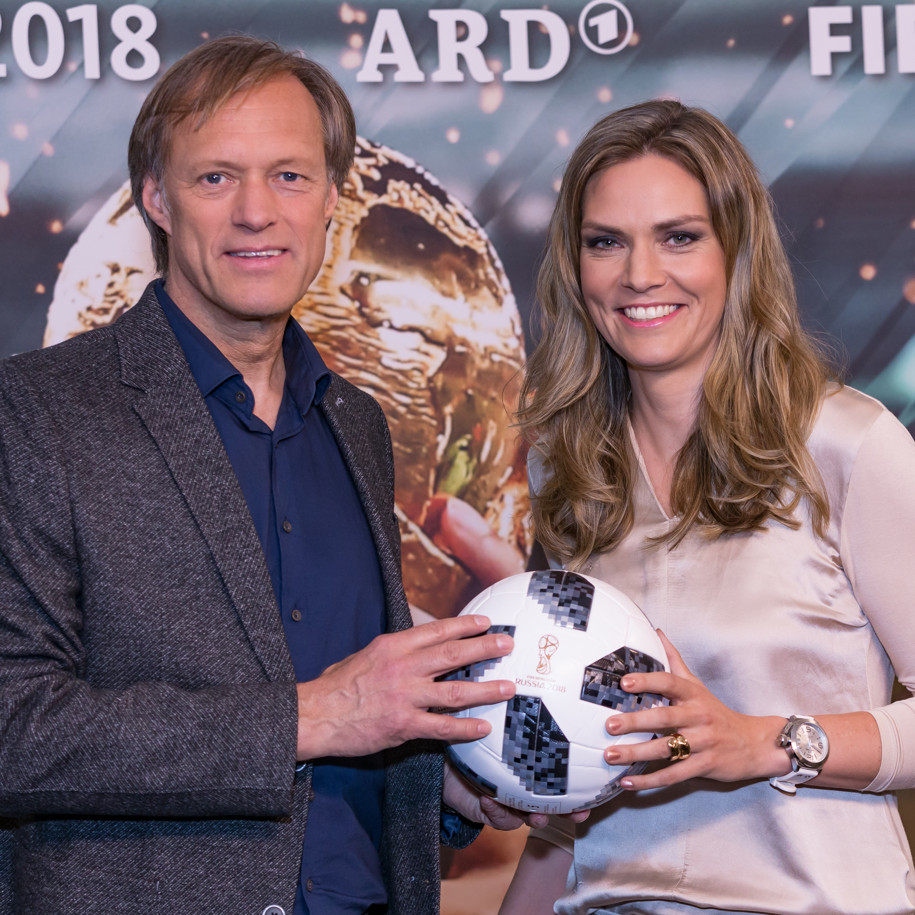 v.li.: Gerhard Delling, Julia Scharf; ARD-Moderatoren